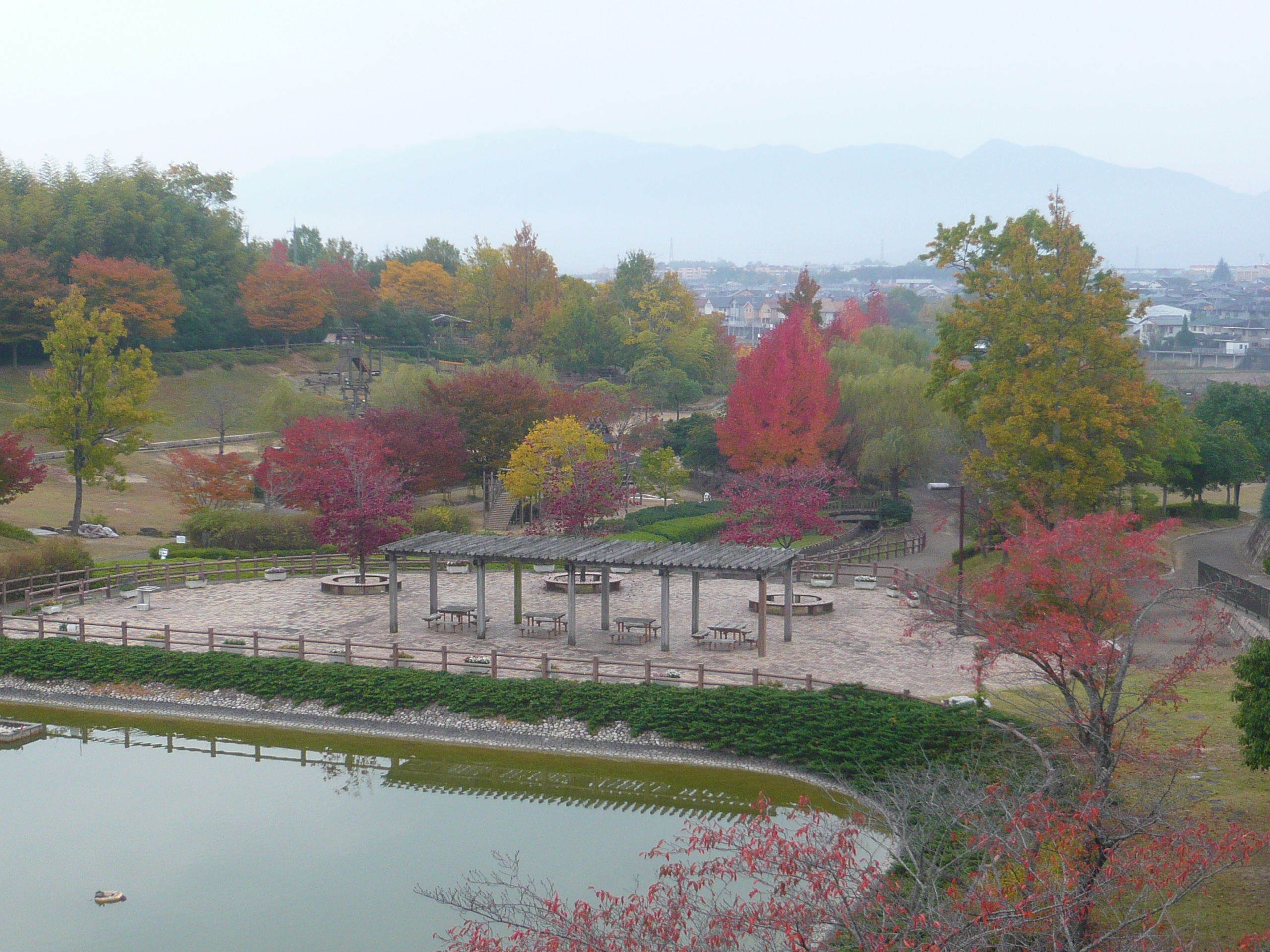 竹取公園 Taketori kōen 2010.11.14